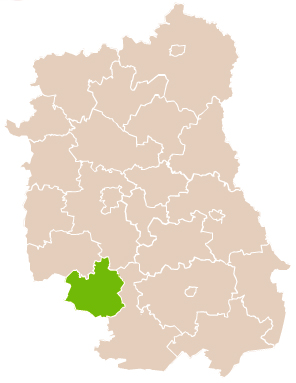 Map of Janów Lubelski county, Lublin voivodship Mapa powiatu janowskiego, województwo lubelskie